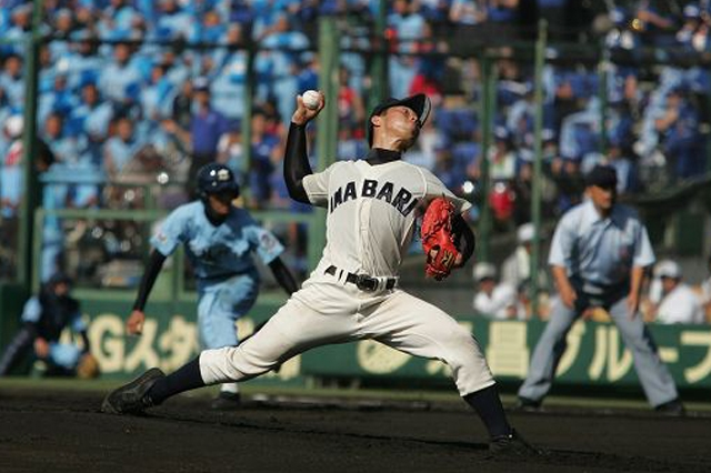 2007 全国高校野球選手権大会 甲子園球場 今治西 熊代聖人投手